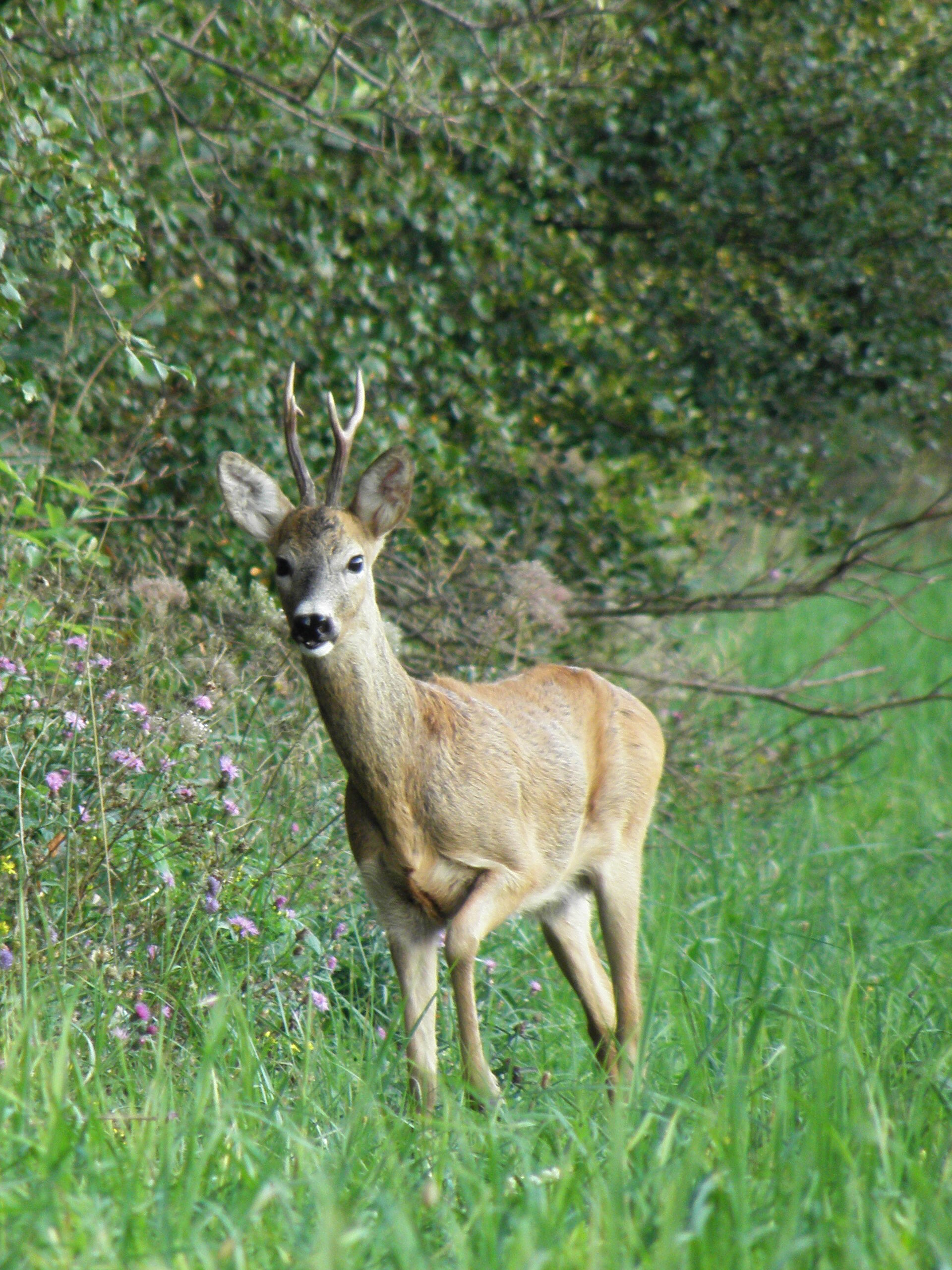 Isane Metskits ehk Sokk. Saaremaa.